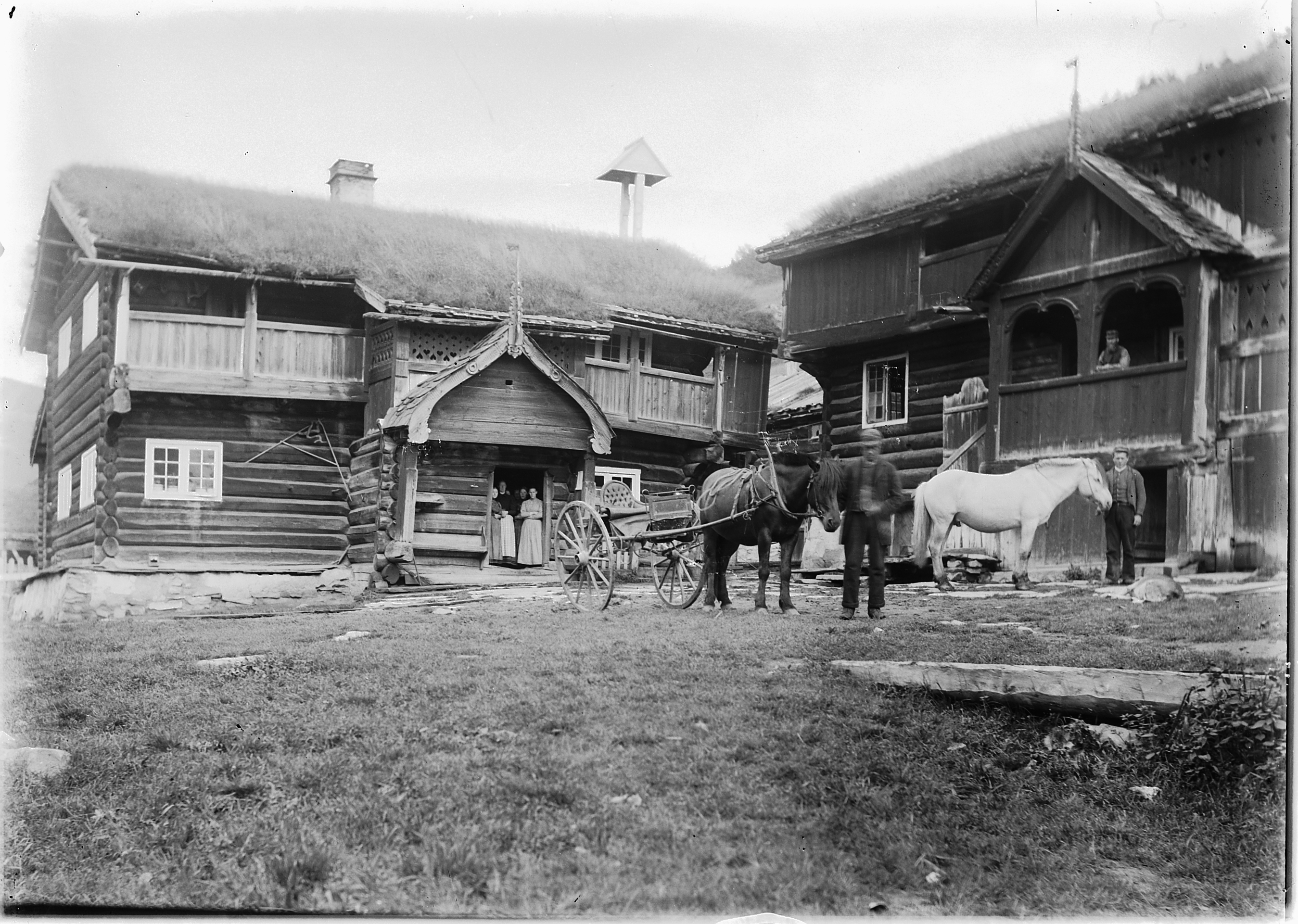 Bjølstad, Heidal i Gudbrandsdalen.